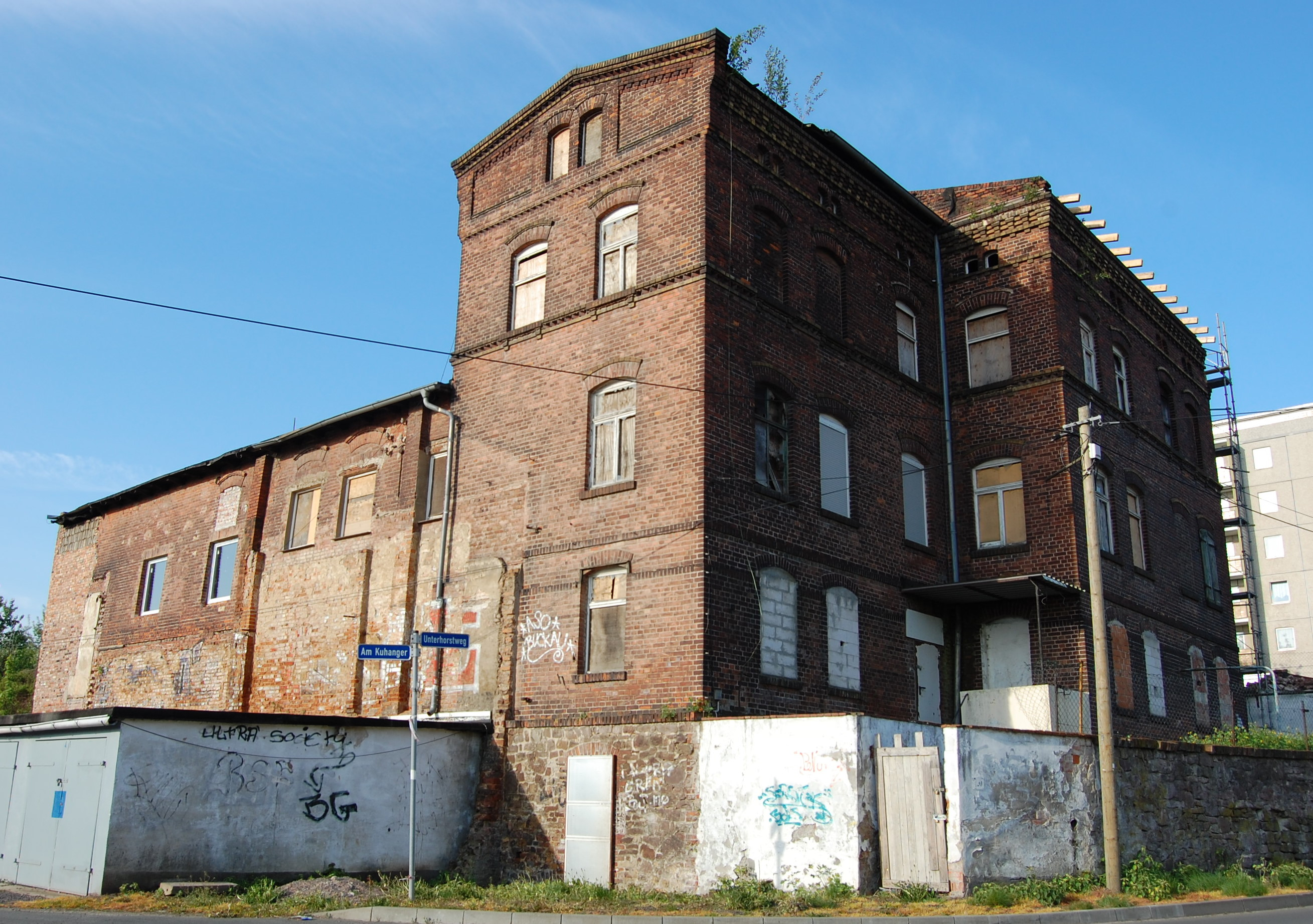 Reste eines Fabrikgebäudes in Magdeburg-Salbke, Unterhorstweg